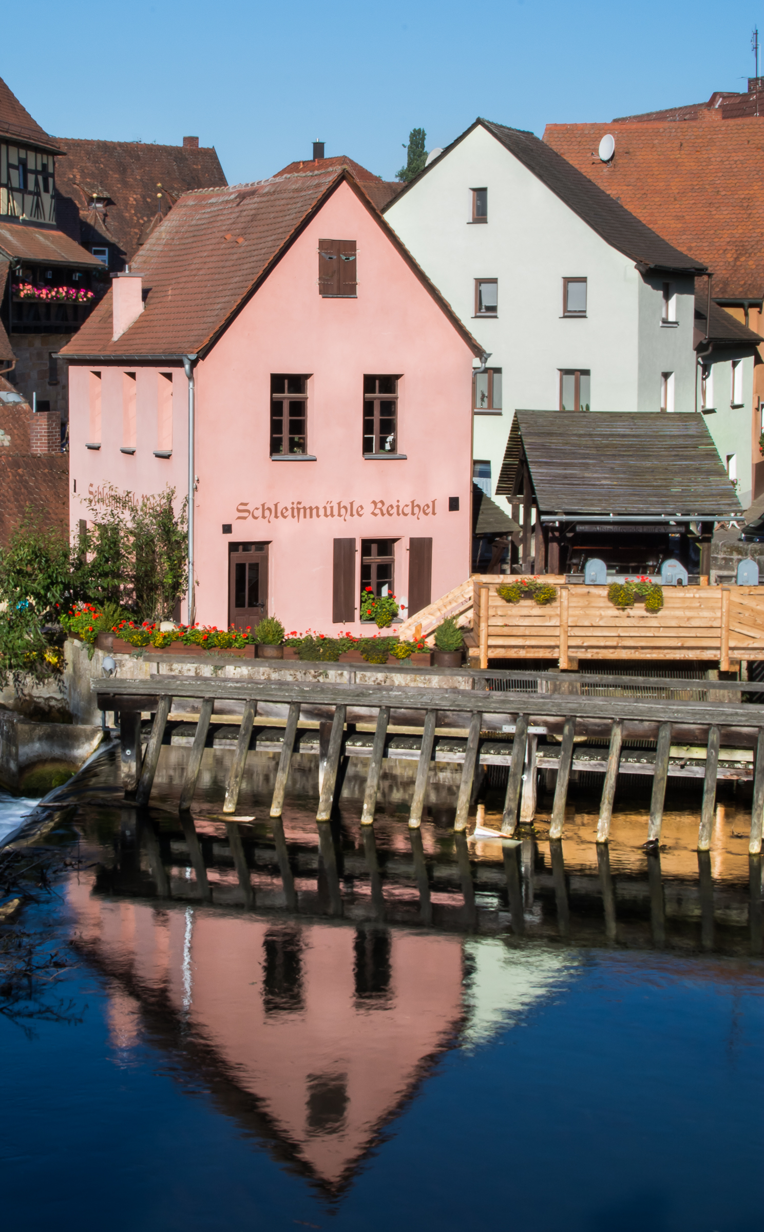 Schleifmühle Reichel (Reichel`sche Schleife) in Lauf a.d. PegnitzThis is a photograph of an architectural monument.